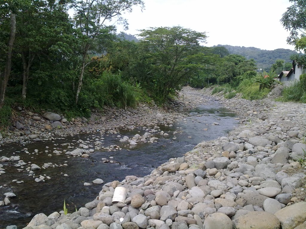 En codo del Río siquirres